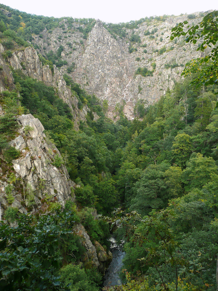 Blick vom Kesselrücken im Bodetal